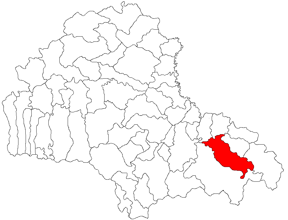 Categorie:Hărţi ale judeţului Braşov